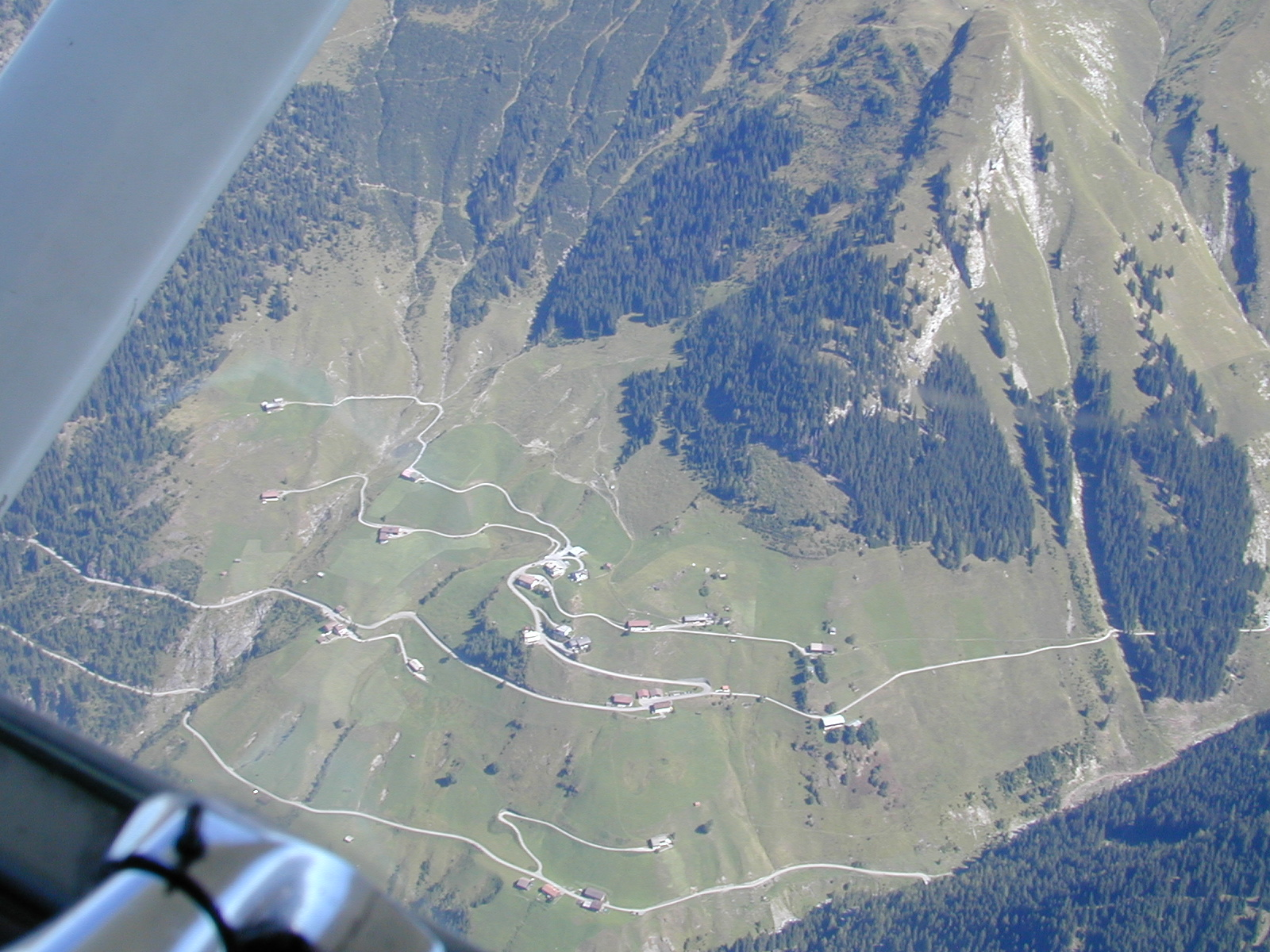 Luftbild Kaisers